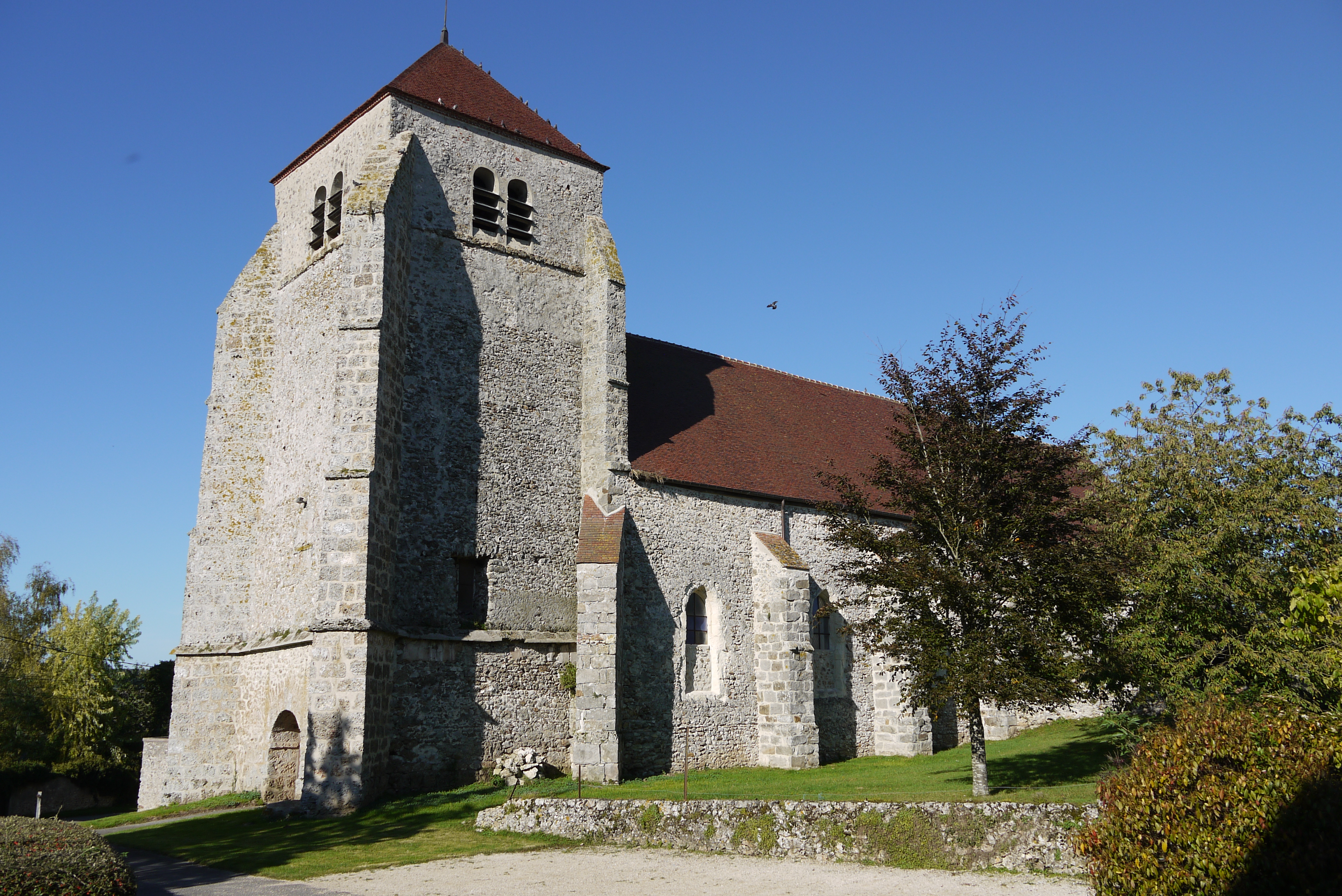 Église Saint-Jean-Baptiste de Vendières